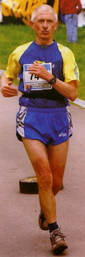 Günther Pohl beim Rennsteiglauf Supermarathon 2004